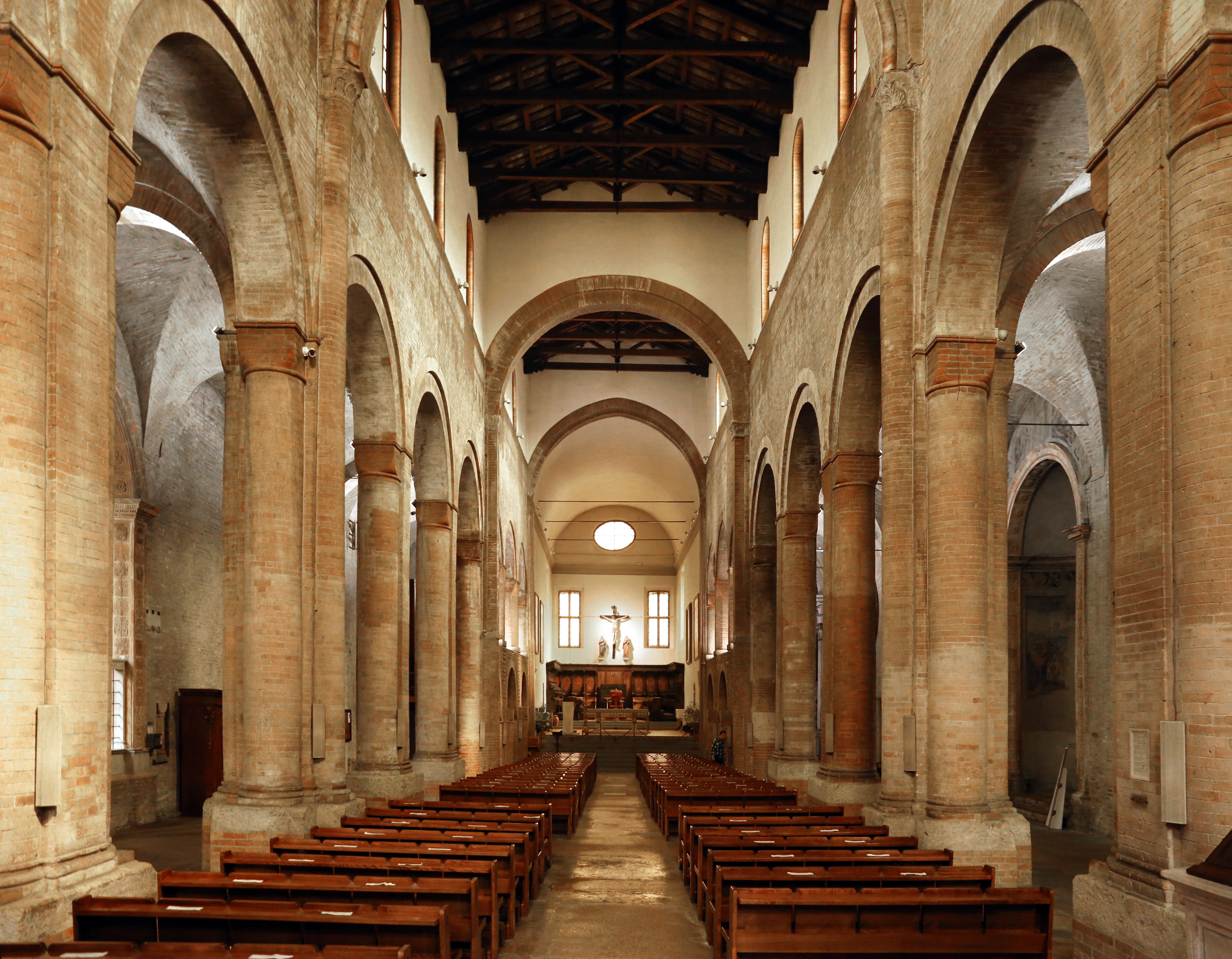 abbazia di San Mercuriale This is a photo of a monument which is part of cultural heritage of Italy.